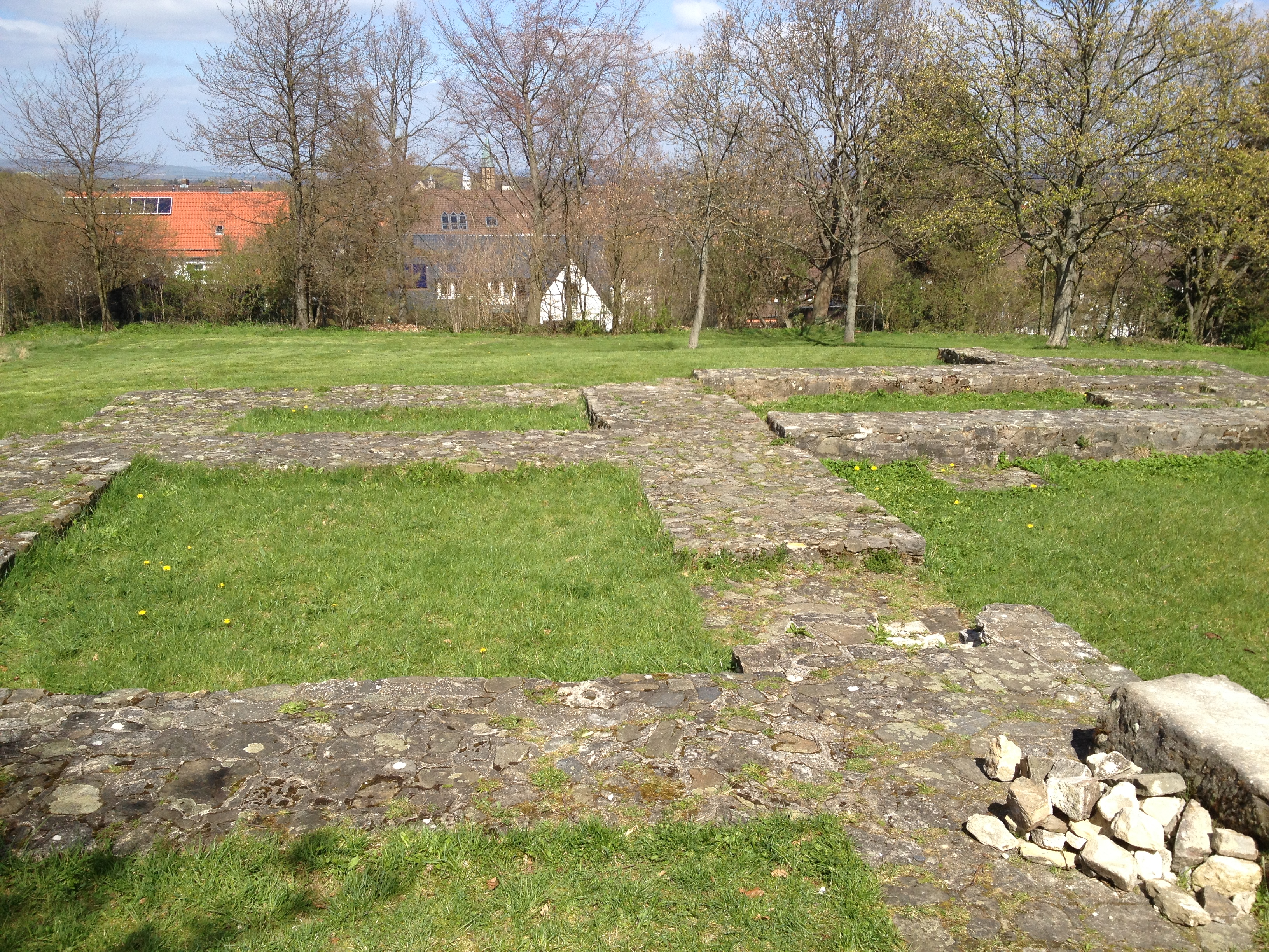 Grundmauern der St.-Johannes-Kirche am Rammelsberg, Westwerk (im Hintergrund die Türme der Markt- und der Neuwerkkirche)